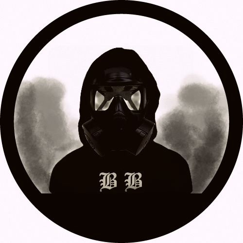 illustrazione disegnata di un black bloc